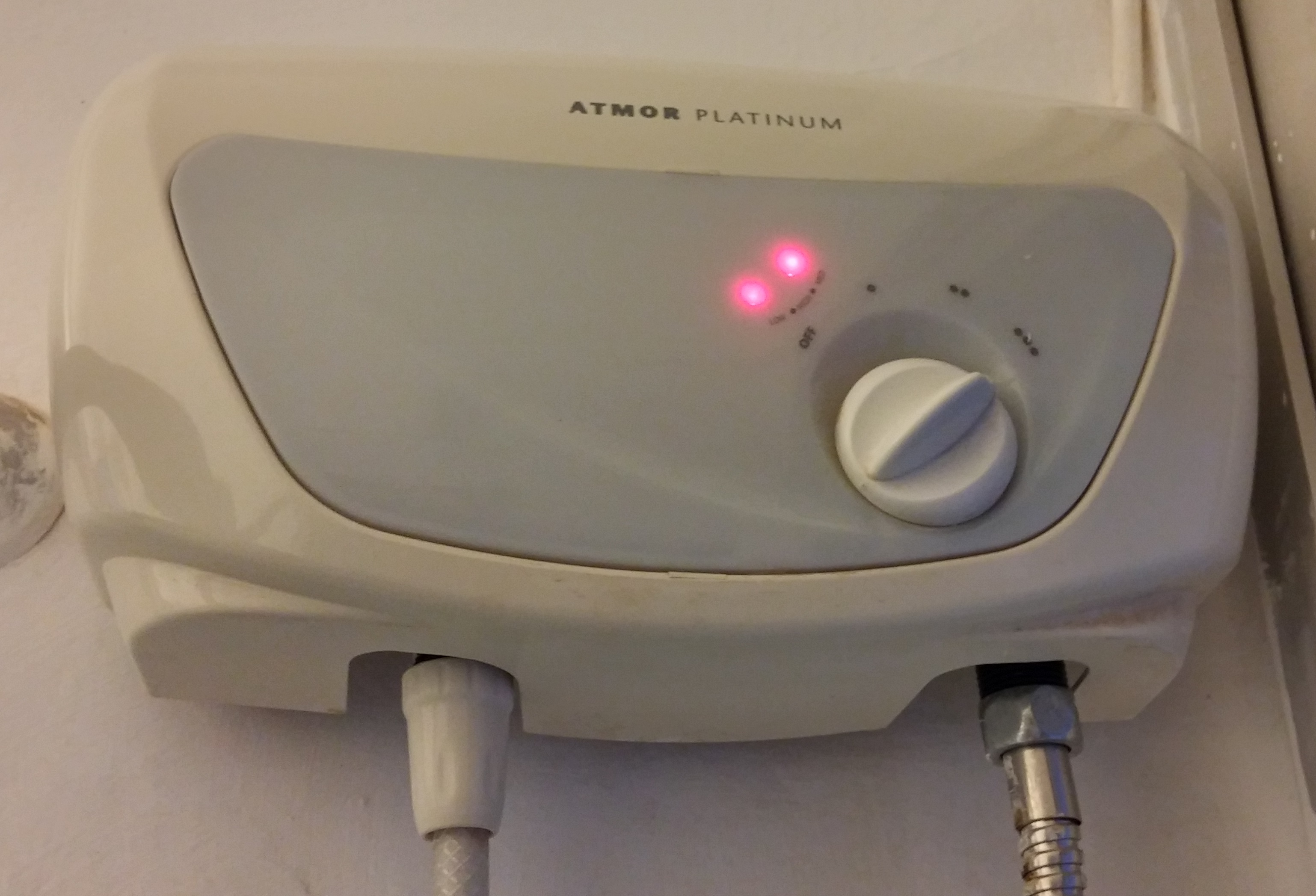 מחמם מים מידי אטמור